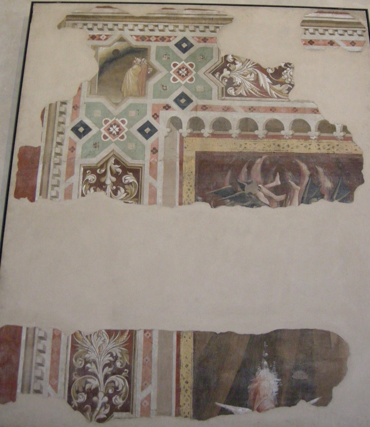 Refettorio santa croce, frammento di andrea orcagna